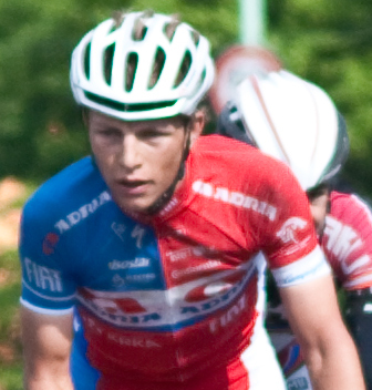 Klemen Štimulak